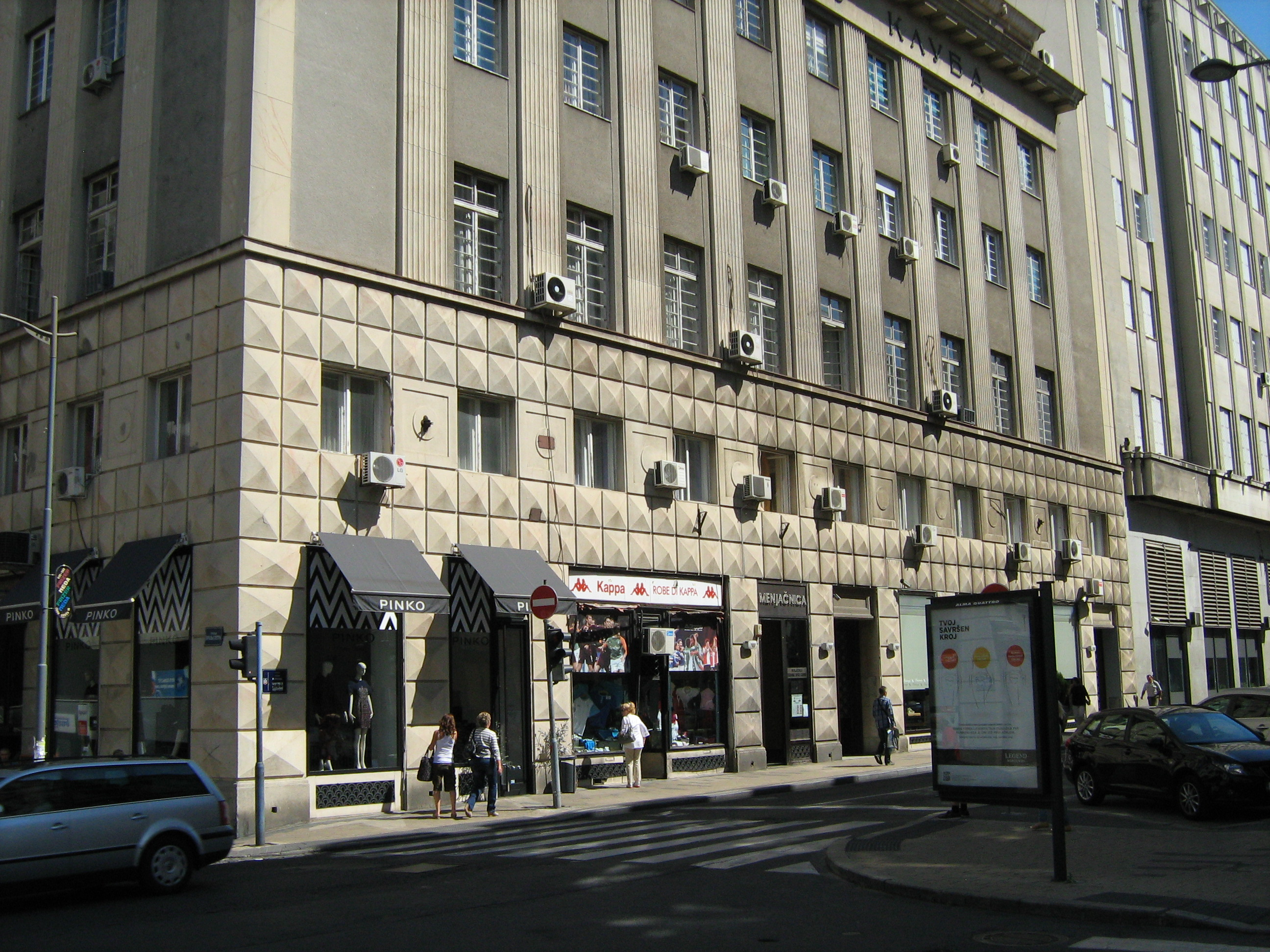 Зграда Аеро клуба, угао Узун Миркове 4 и Краља Петра 36, Београд